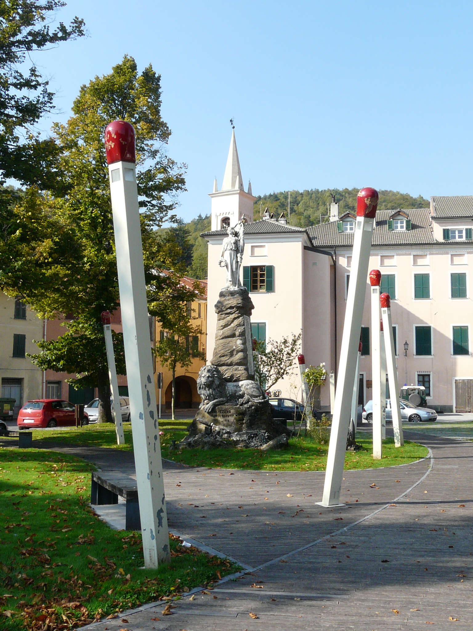 Monumento ai caduti di Calizzano, Liguria, Italia